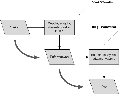 Veri-enformasyon-bilgi ilişkisi; veri ve bilgi yönetimi